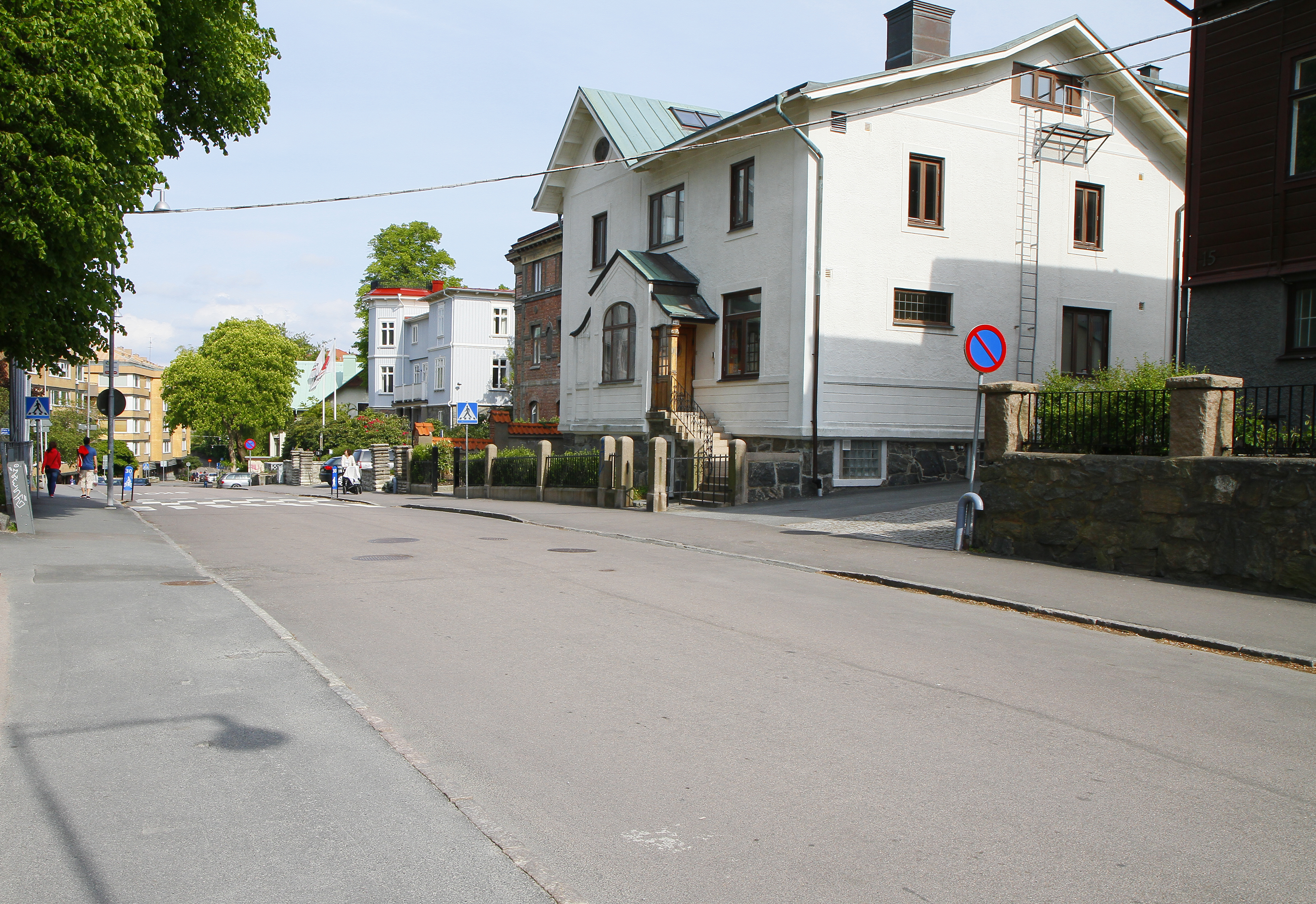 Föreningsgatan 17, Vasastaden, Göteborg i Maj 2011.